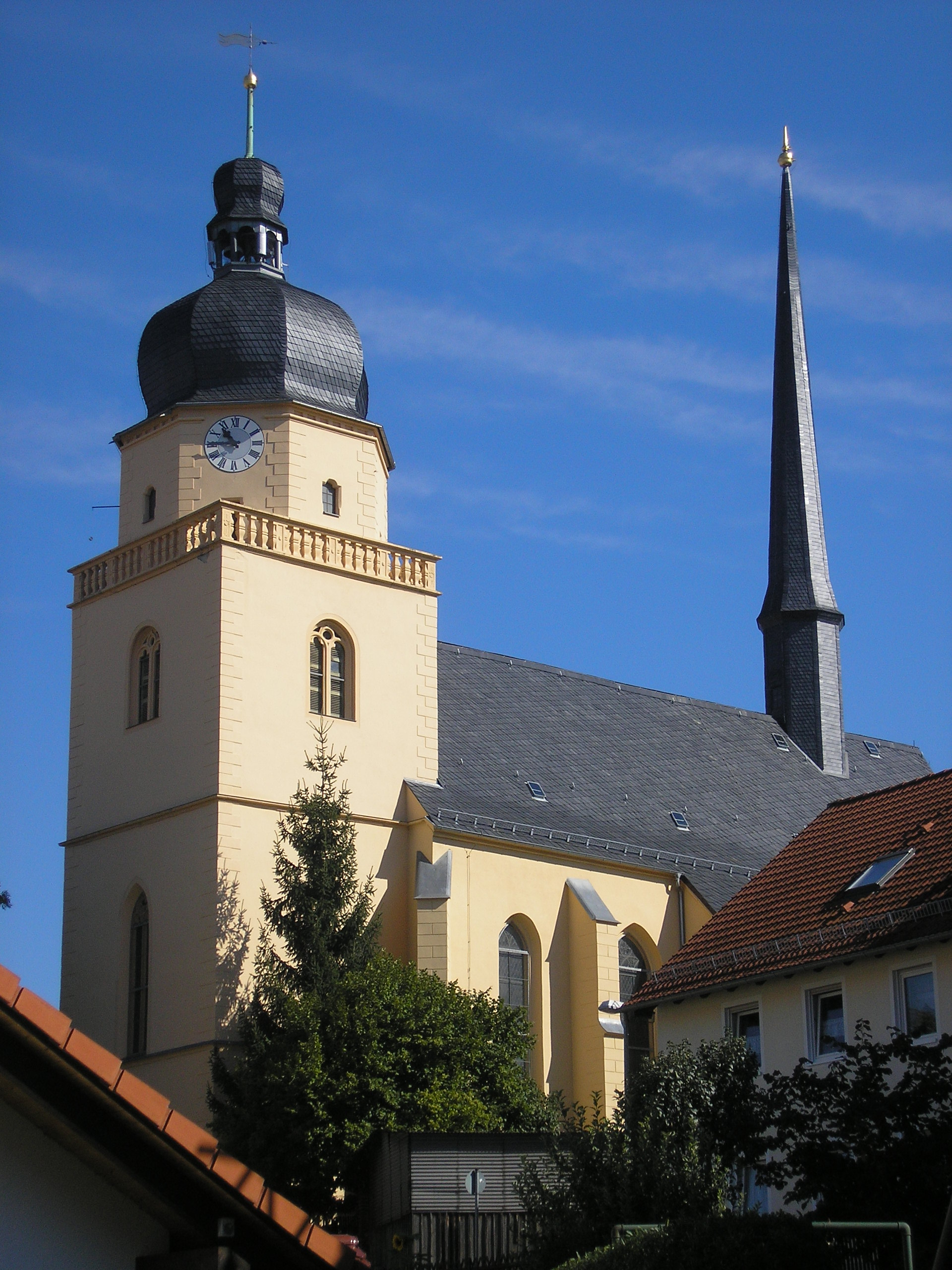 Die Stadtkirche in Gößnitz (Thüringen).